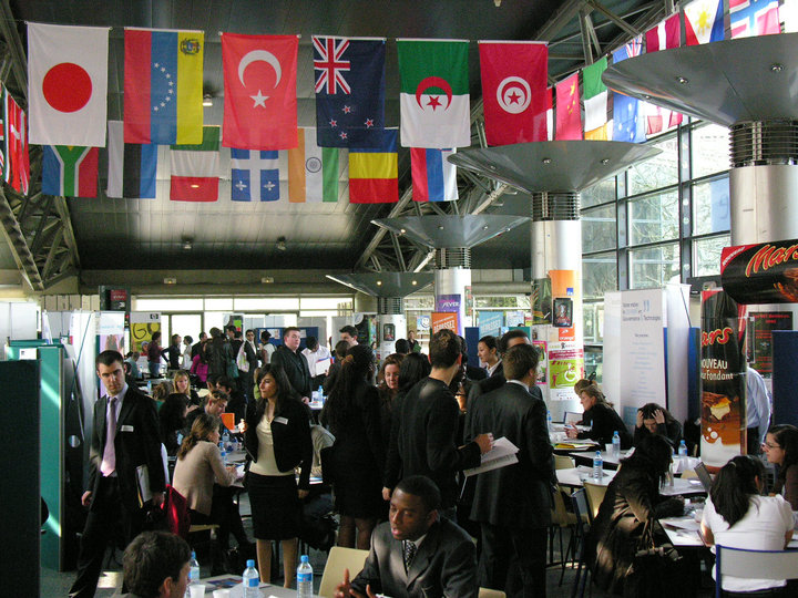 Le Forum des Télécommunications, évènement annuel sur le campus de Télécom Ecole de Management et de Télécom SudParis